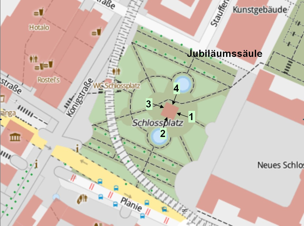 Lage der Sockelreliefs an der Jubiläumssäule auf dem Schlossplatz in Stuttgart. Inschriftentafeln der Reliefs: 1. Huldigung beider Ständekammern am 30. October 1841. 2. Die Erstürmung der Stadt Sens am 11. Februar 1814. 3. Das Treffen von La Fère Champenoise am 25. März 1814. 4. Die Schlacht von Brienne am 29. Januar 1814.